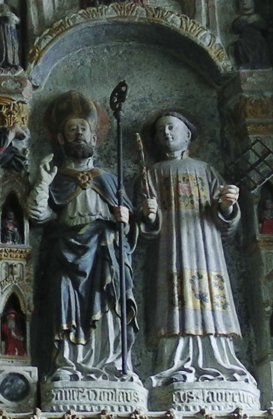 San Nicola e San Lorenzo. Particolare dell'Ancona di San Clemente